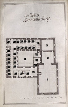 Kapuzinerkloster Waldshut Lageplan des Mittelgeschosses aus der Architectura Capuzinorum mit Beschriftung auf der Grundlage von Walther Hümmerich 1987.